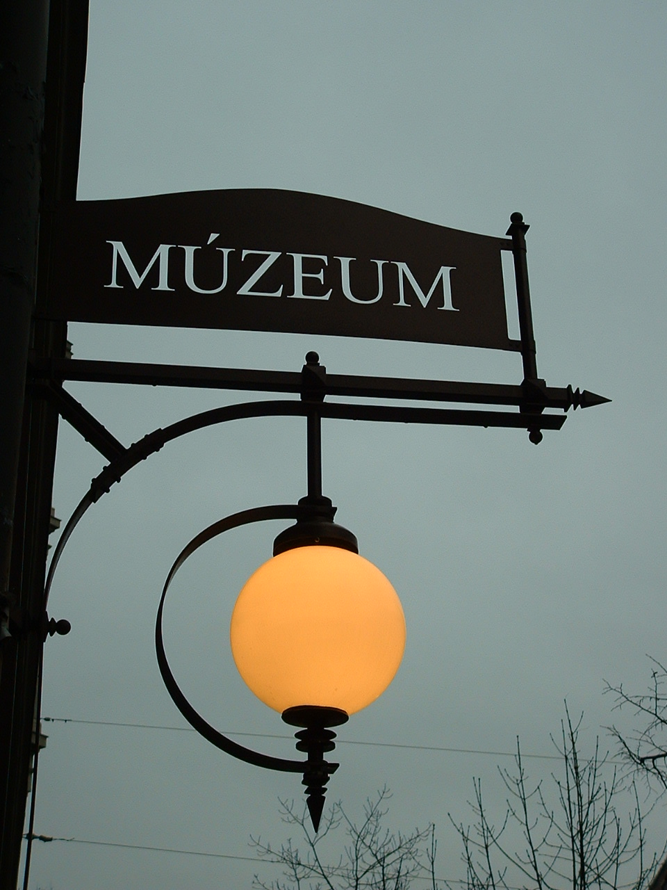 Múzeum kávéház felirata (Múzeum krt. 12., Budapest VIII.)